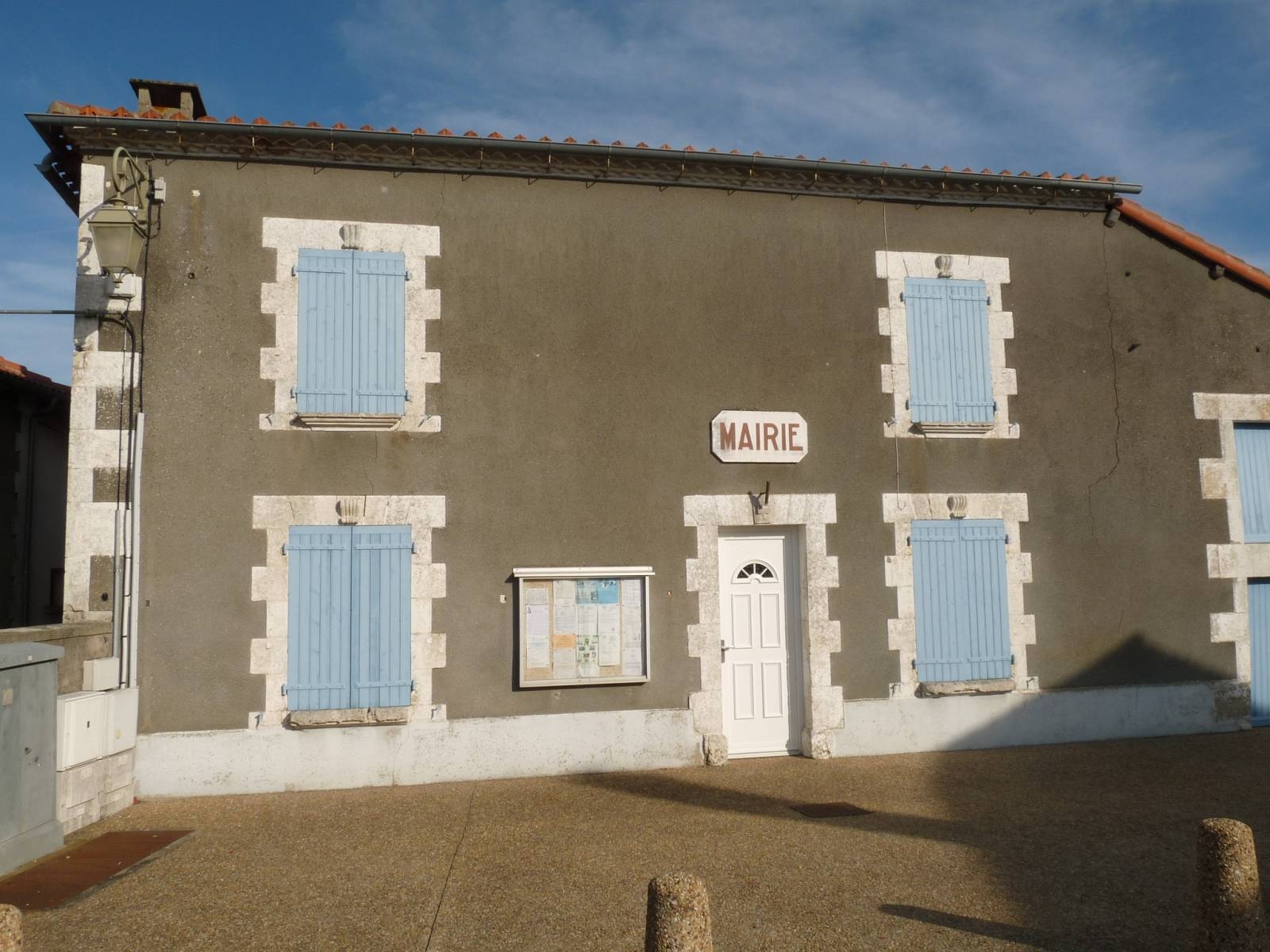 mairie du Vieux-Cérier, Charente, France